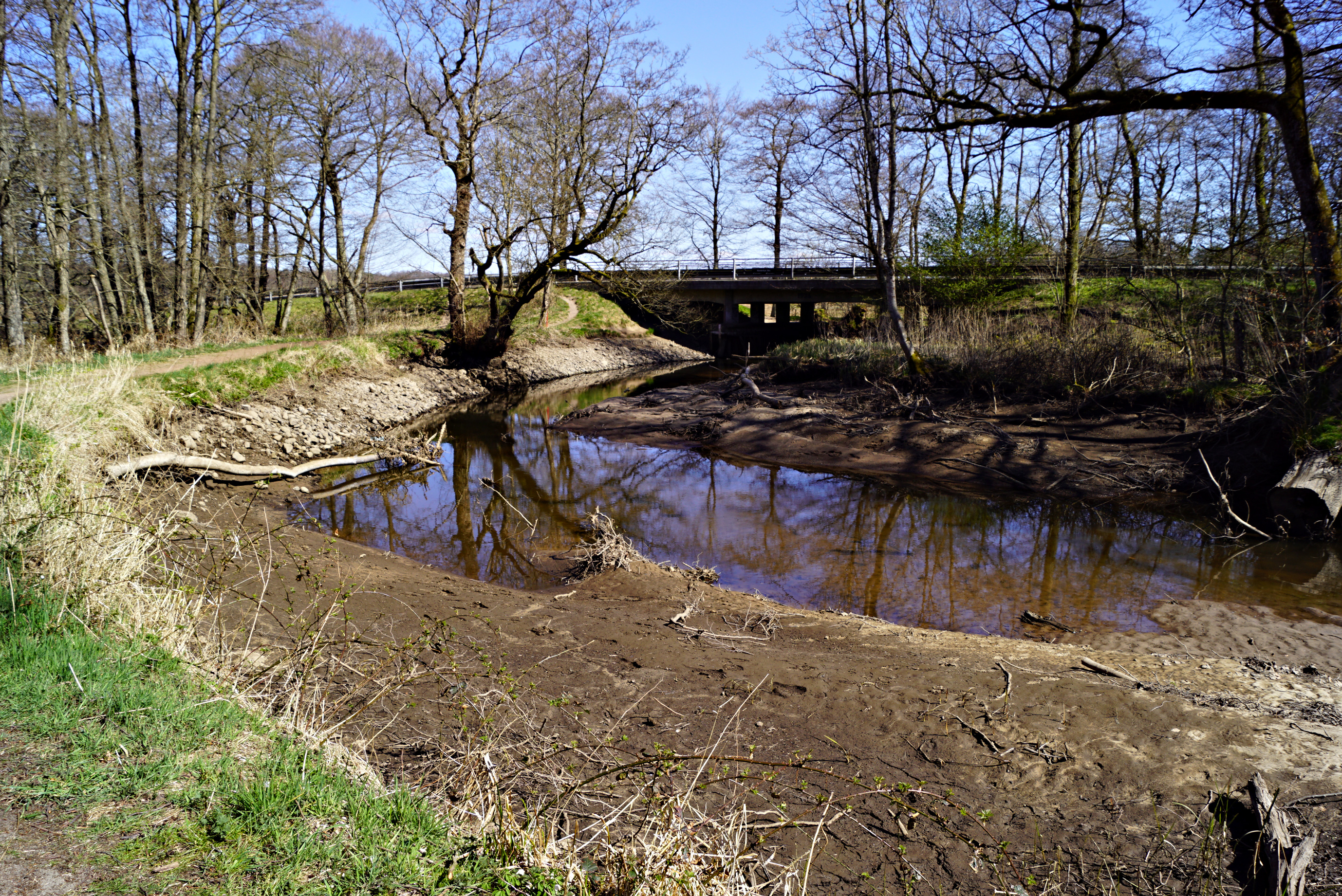 Gudenåen ved Klostermølle, Klosterkanalen efter omlægning april 2020, set mod øst